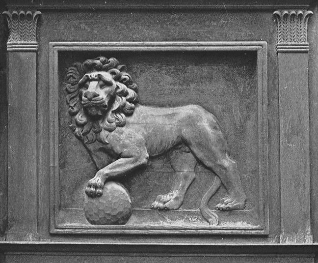 Hovapoteket Lejon i Sidenhuset, apoteksskylt